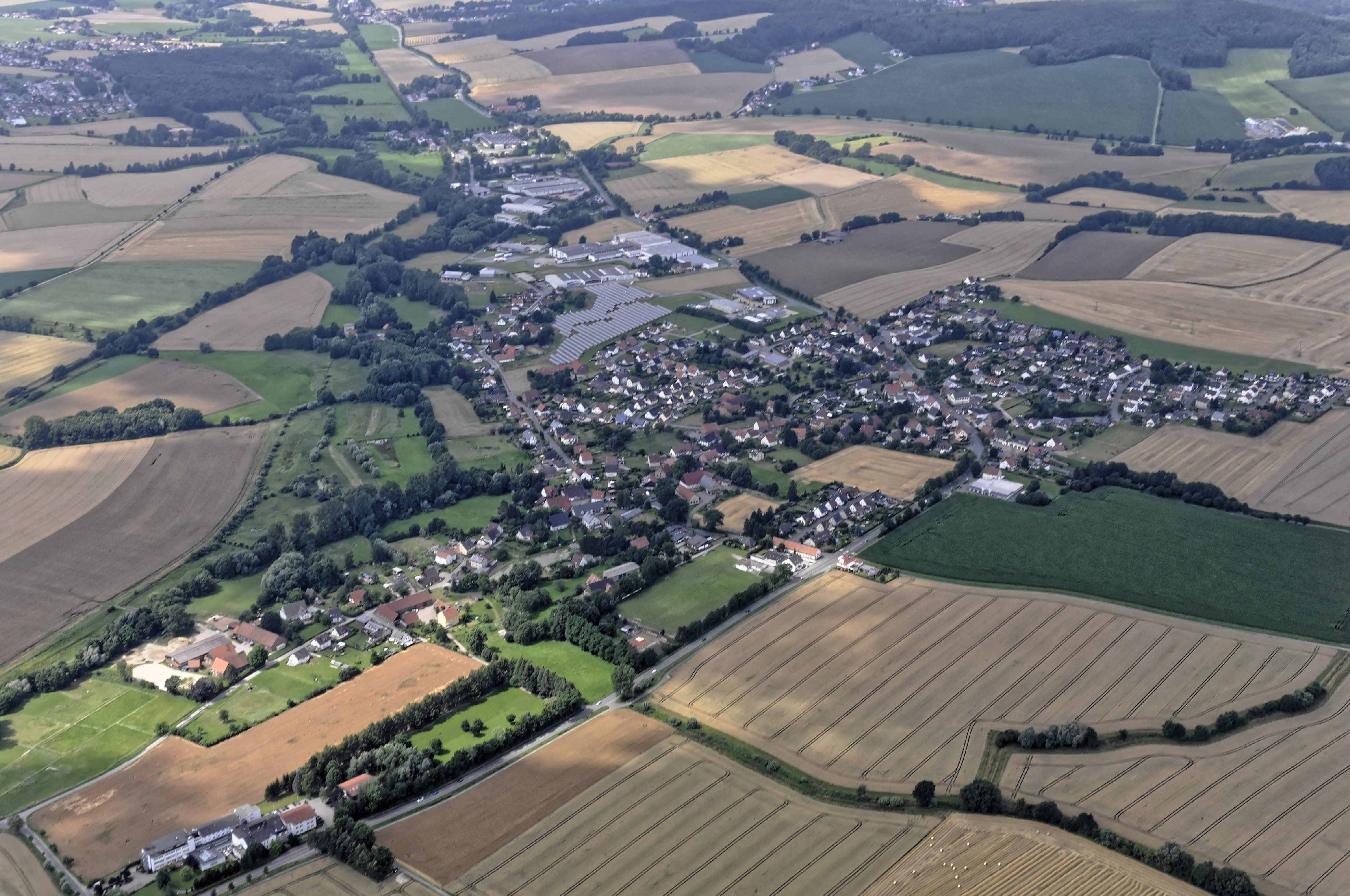 Bilder vom Flug Nordholz-Hammelburg 2015: Humfeld